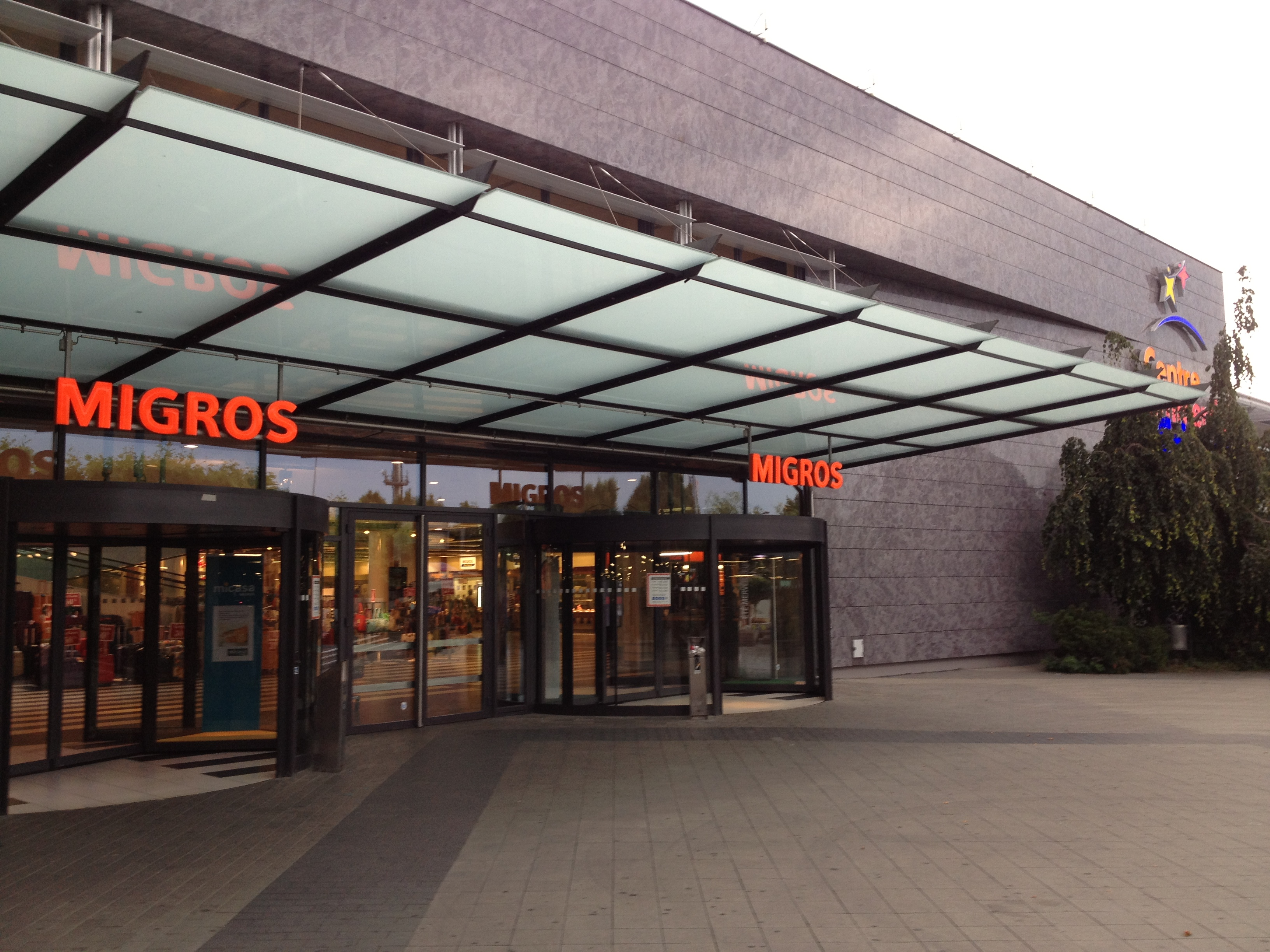 Le Centre commercial Crissier dans le canton de Vaud en Suisse